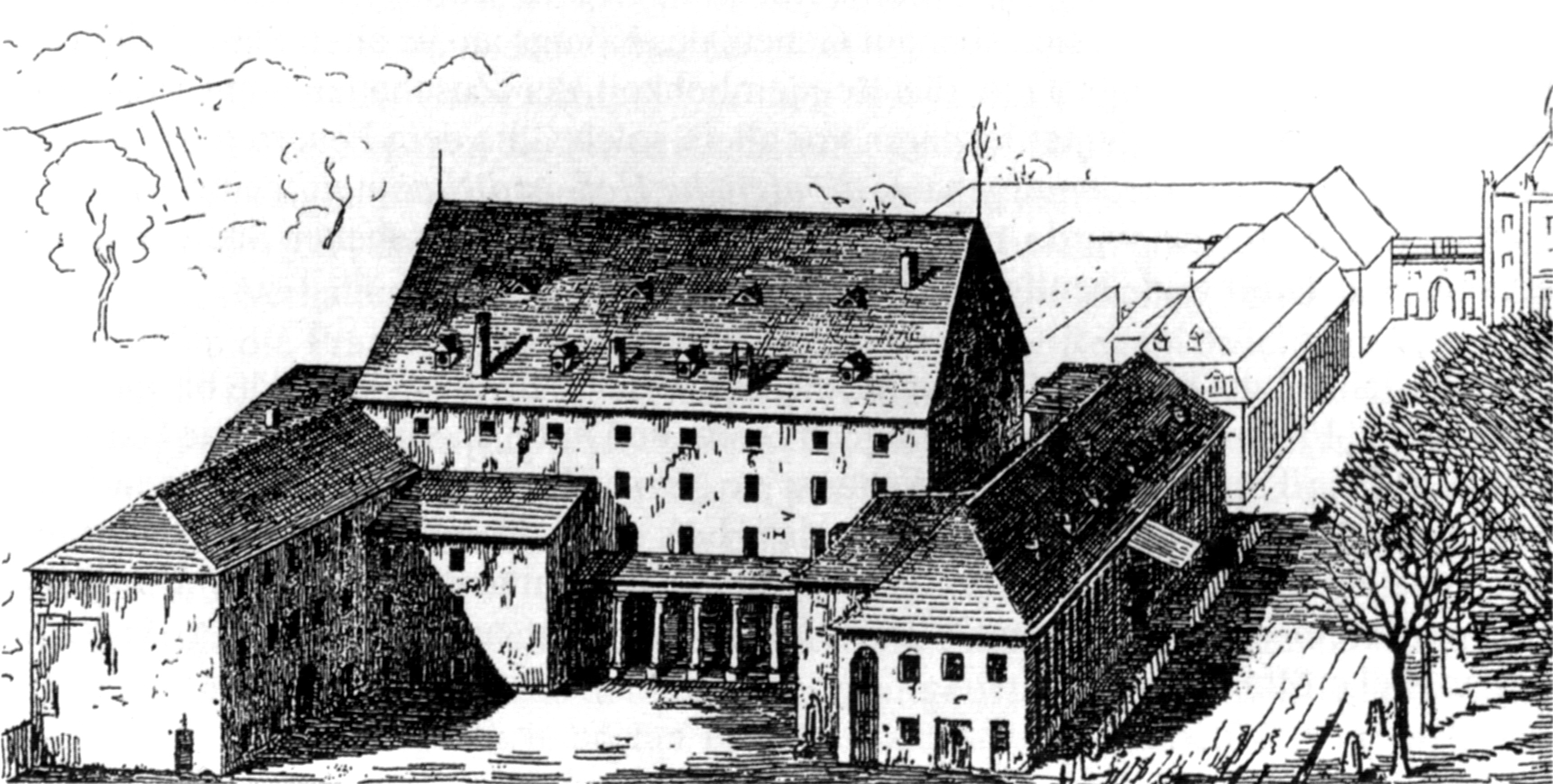 Karlsruher Hoftheater von Friedrich Weinbrenner, eröffnet 1808, zeitgenössischer Zeitungsdruck